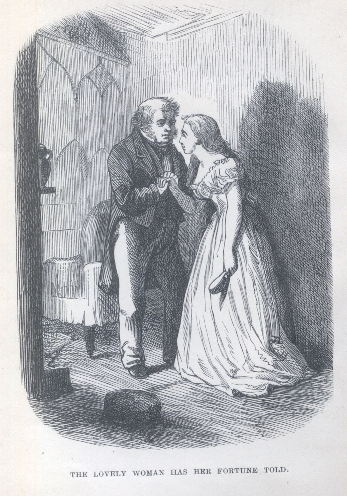 Illustration, sprich Radierung, aus Charles Dickens Our Mutual Friend, 1864, von Marcus Stone: The Lovely woman has her fortune told.